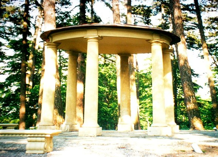 Glorietta. Blisko dwustuletnia budowla na wzgórzu Goruszka (411 m.), znajdującym się w centrum Jaworza.